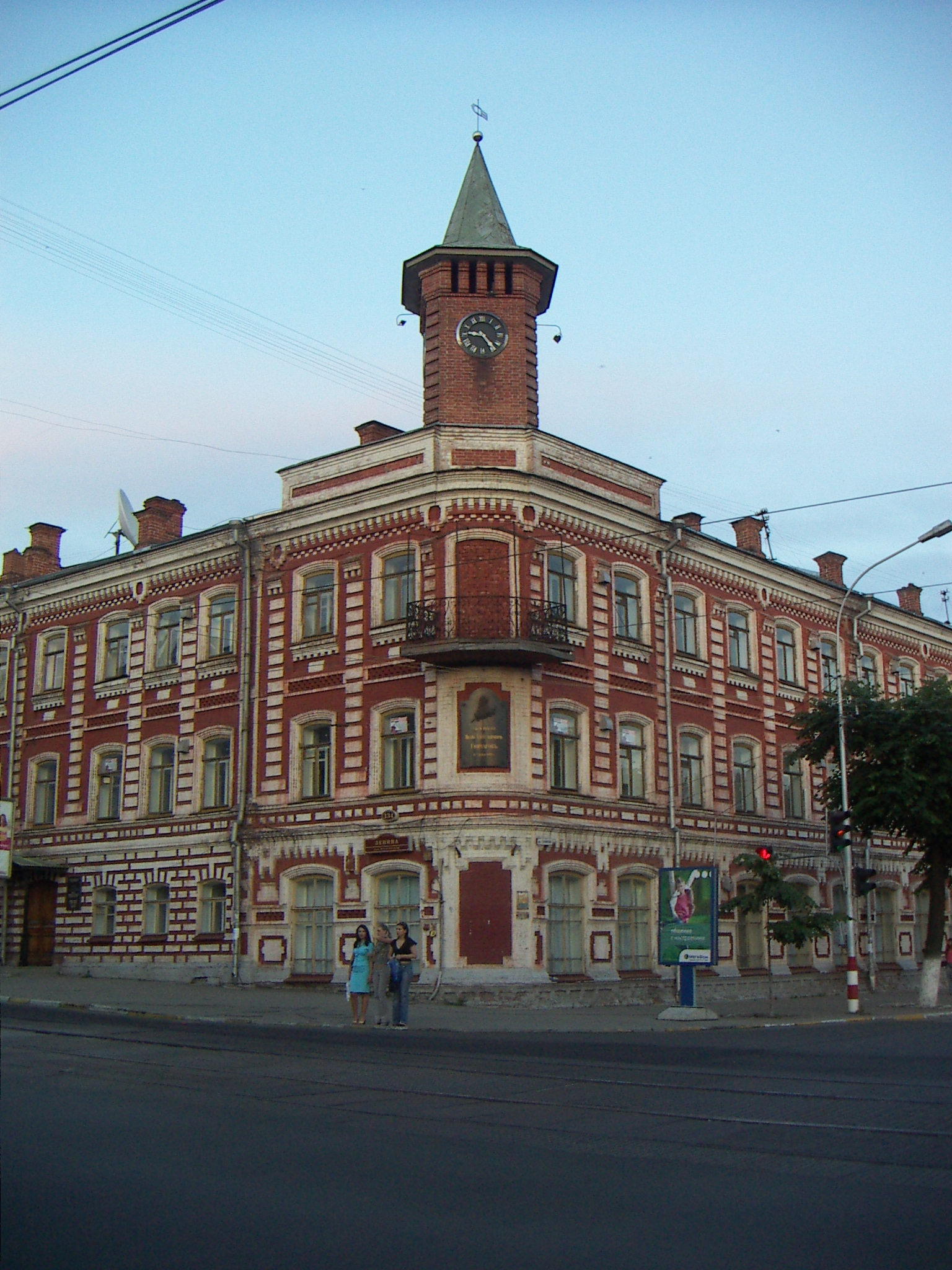 le musée Gontcharov de la ville d'Oulianovsk, région de la Volga.